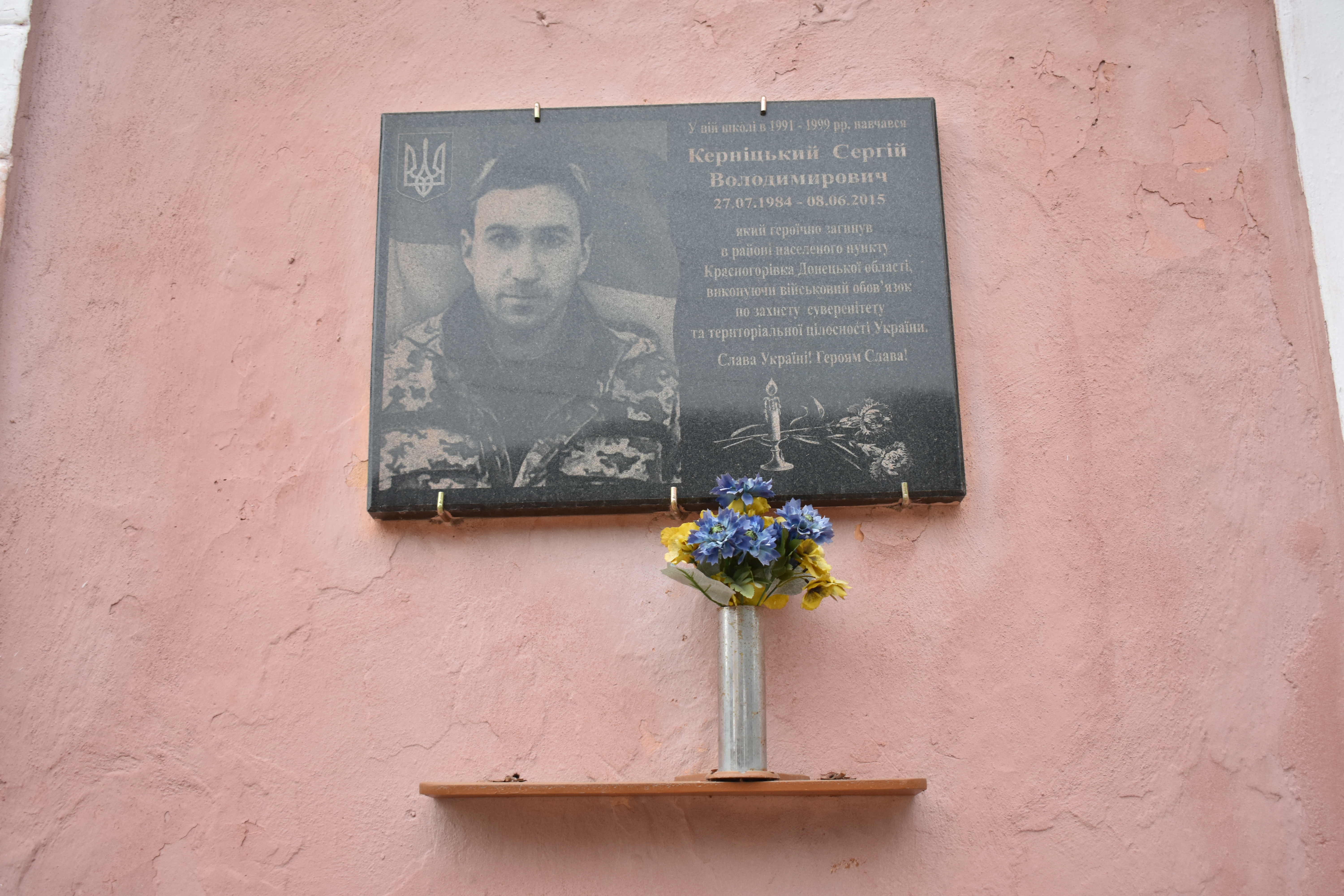 Меморіальна дошка учаснику АТО, с. Бронниця Могилів-Подільський район Вінницька область